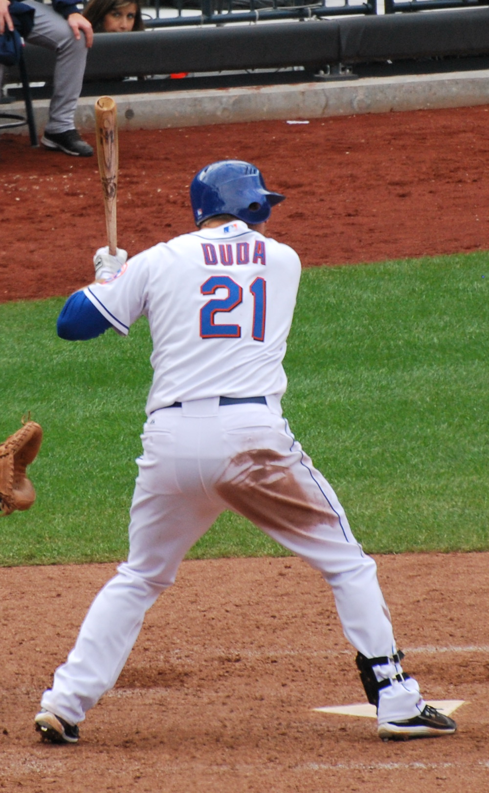 Lucas Duda